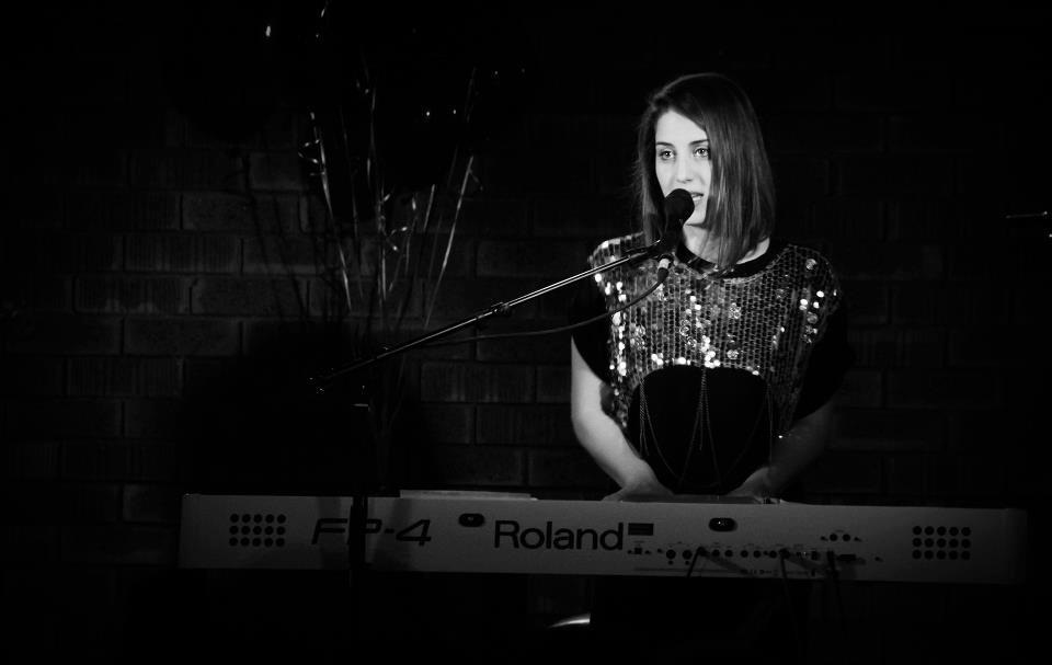 מוריה אור במופע